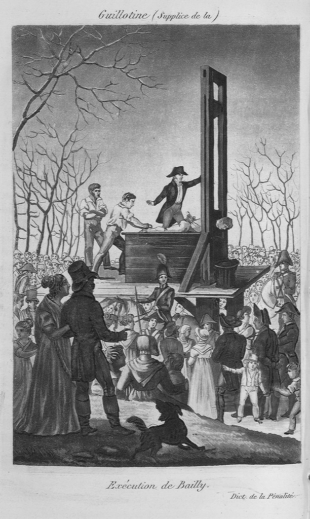 Mort de Bailly, ex-maire de Paris : le 12 novembre 1793, ou 22 brumaire an 2.eme de la République